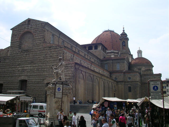 San Lorenzo Square in Florence, Italy